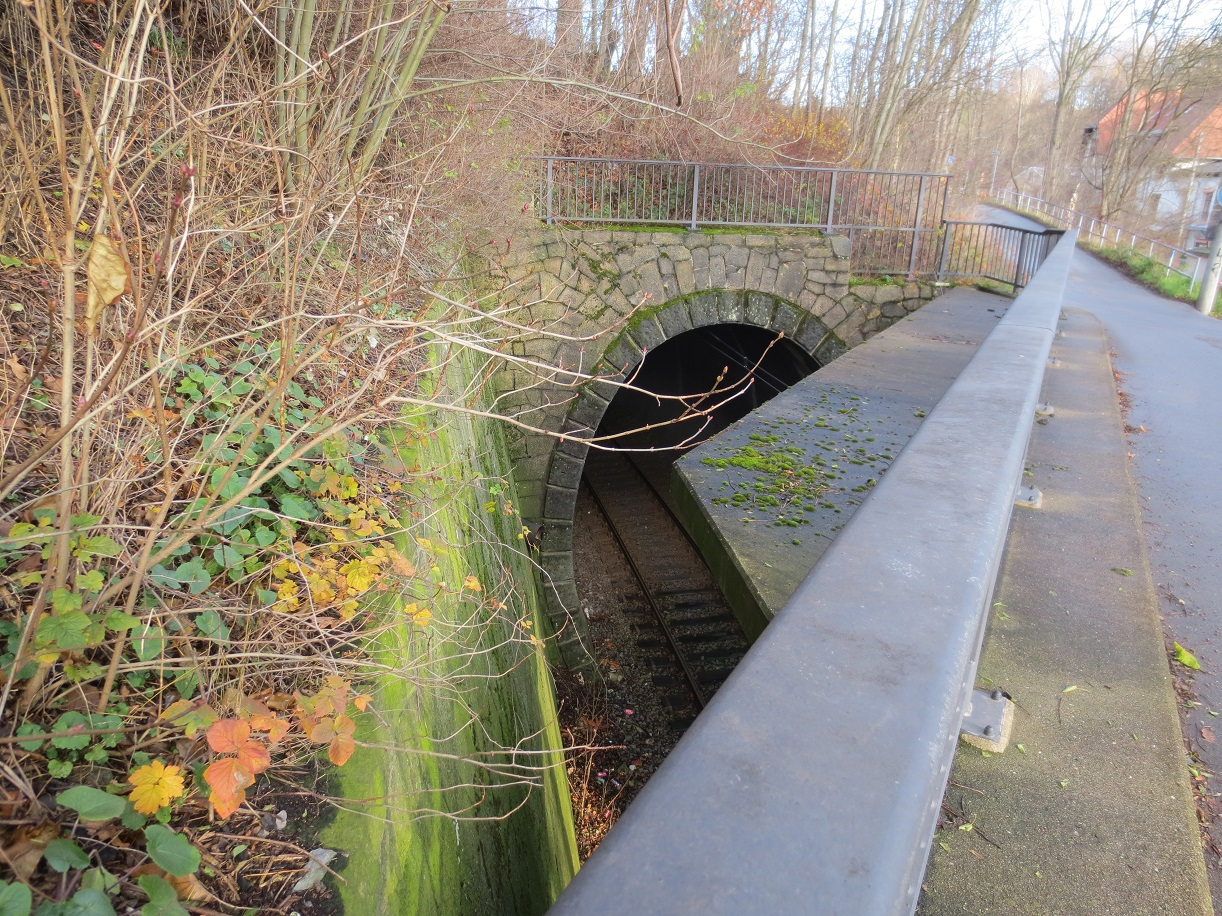 Heute Verbindung zwischen Hauptbahnhof Chemnitz und Stollberg in Sachsen/Erzgebirge. Kulturdenkmal Chemnitz Harthau. (Bahnstrecke Zwönitz–Chemnitz Süd)